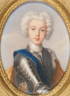 Беннер Ж. Бумага на металлической пластинке, акварель 14,2 x 10,5 (овал)